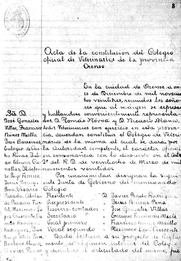 Acta de constitución